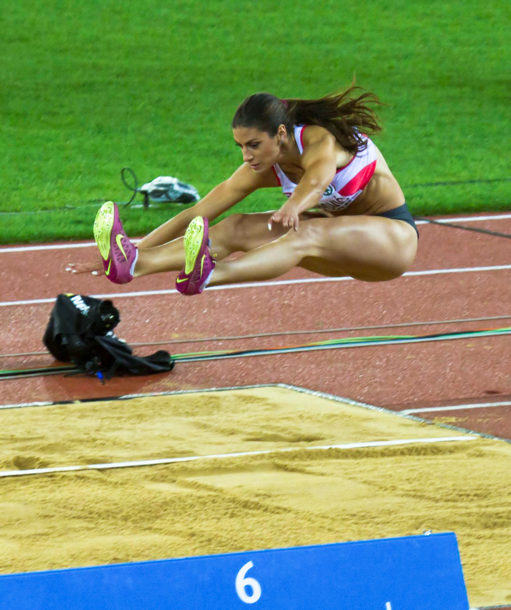 527 zilveren medaille spanovic